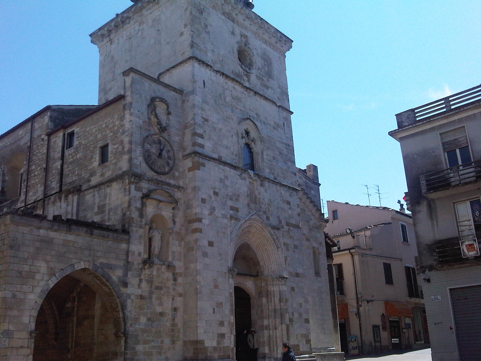 Guardiagrele